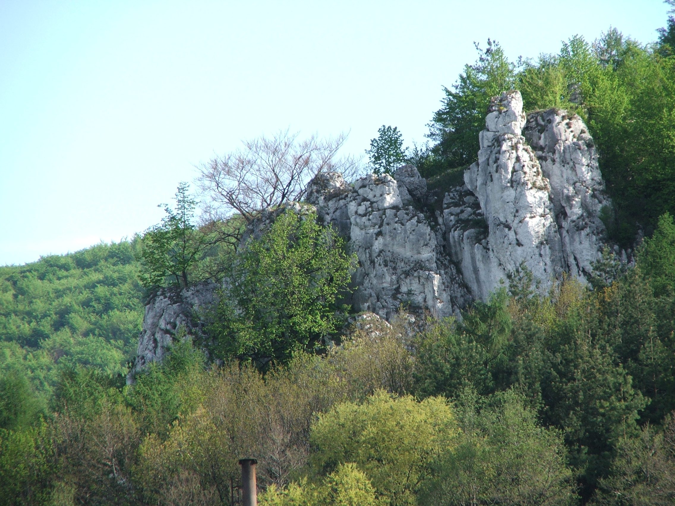 Dolina Racławki (Dolinki Krakowskie)